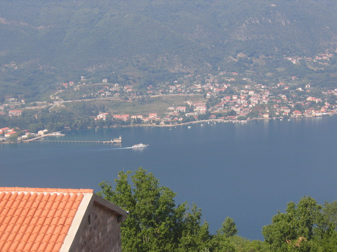 Кумбор (аутор:Никострат Саронски)